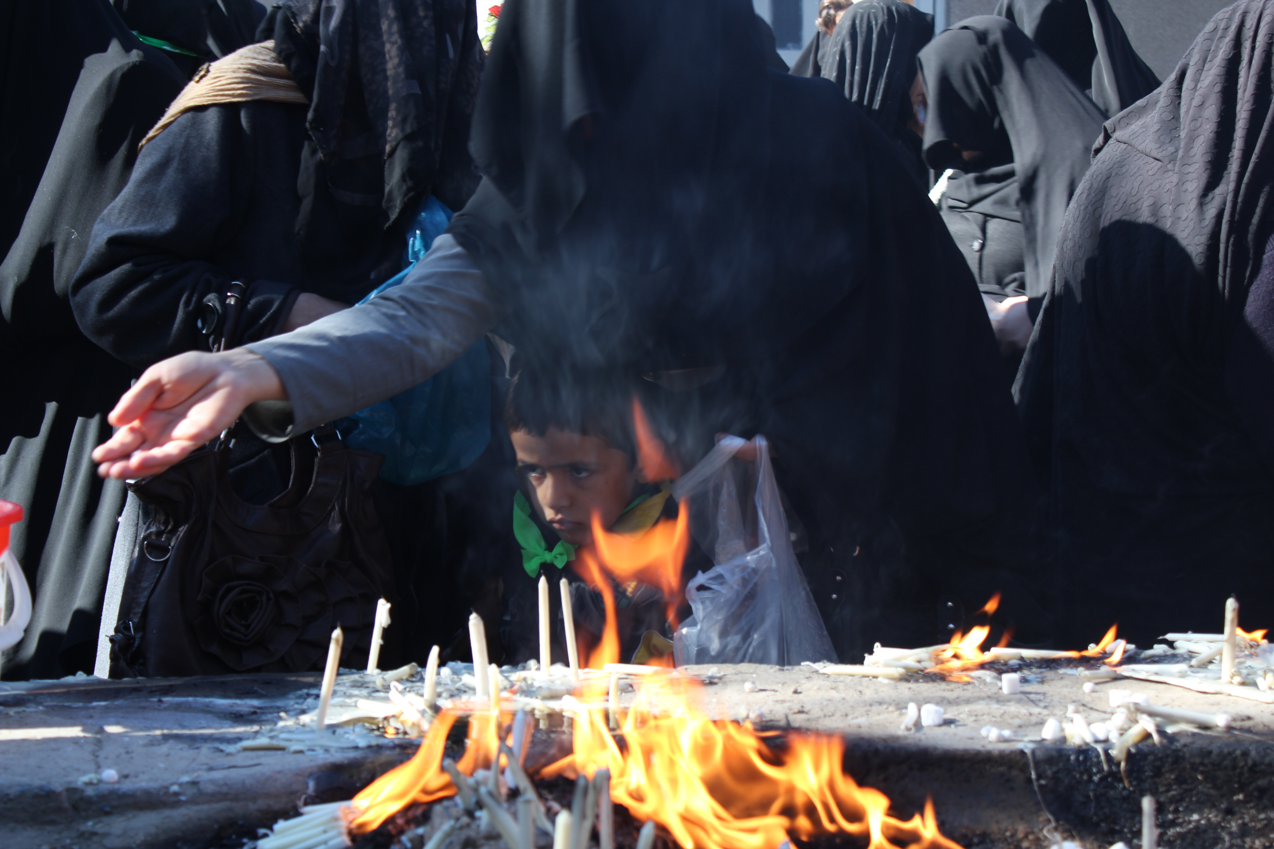 برگزاری آئین چهل‌منبر - ظهر تاسوعا - خرم‌آباد 40manbar ceremony - noon Tasooa - Khorramabad